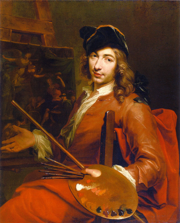 Self-portrait of Zeger Jacob van Helmont